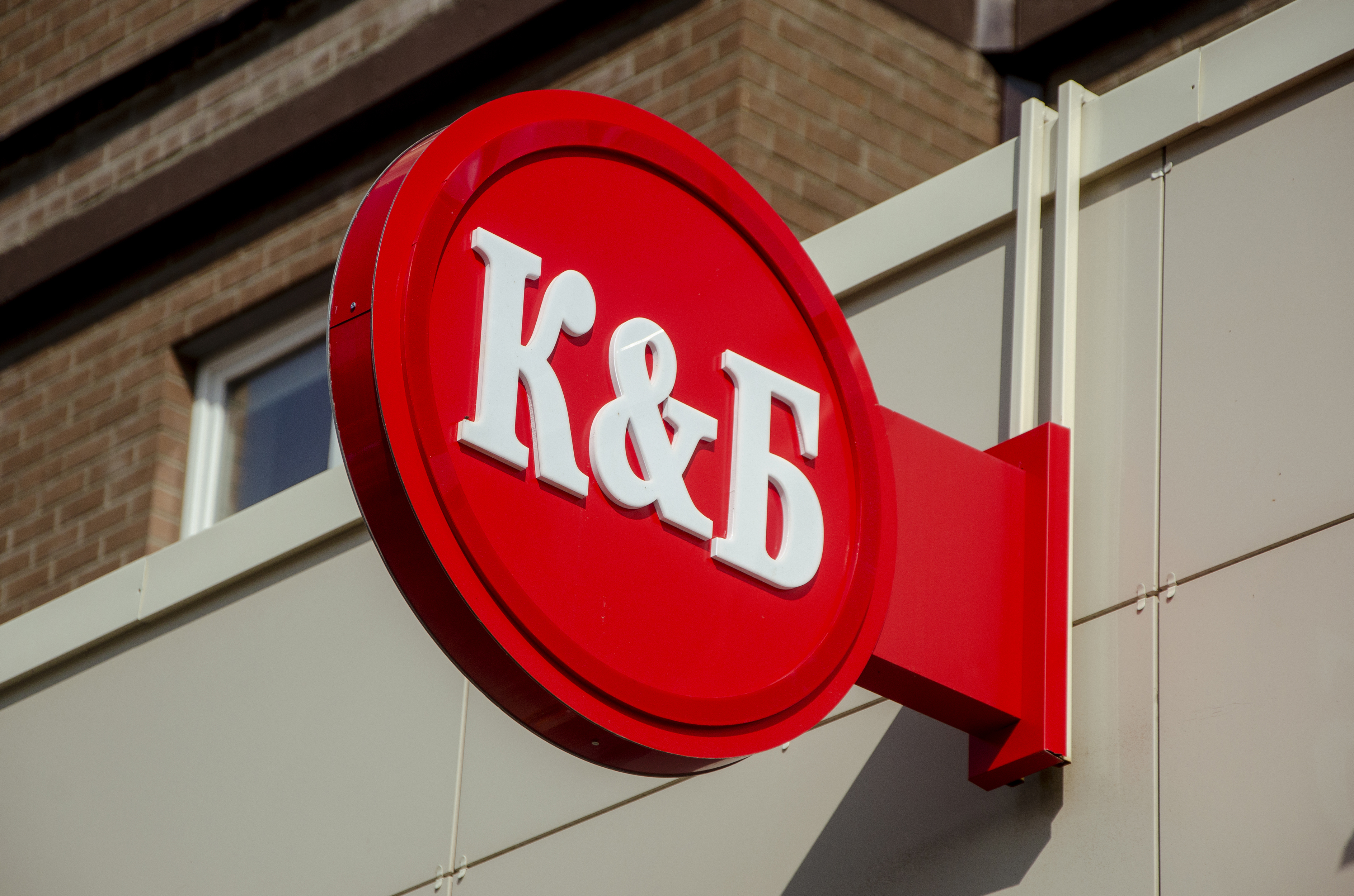 Вывеска K&Б